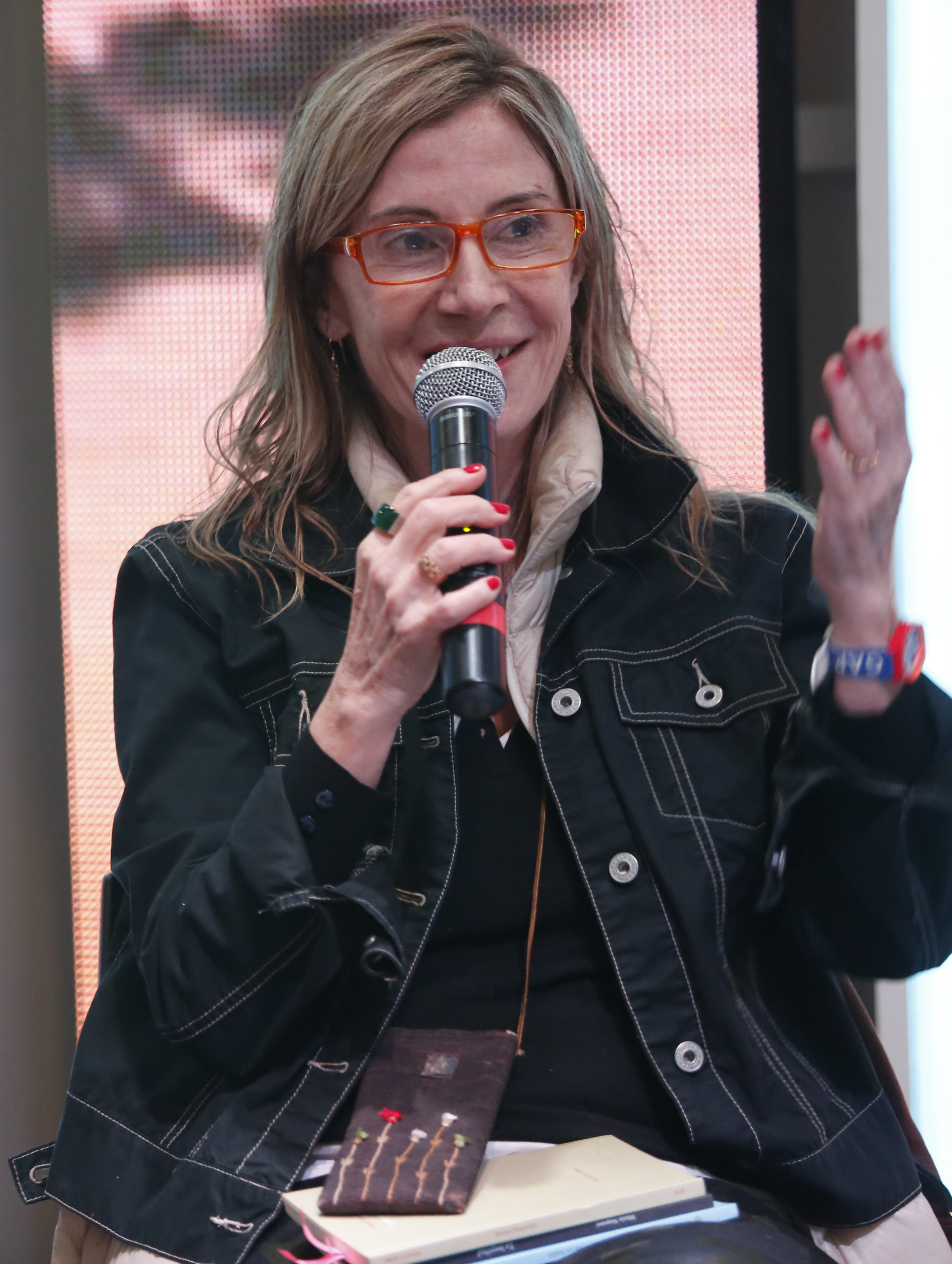 María Negroni. Ciclo Letra y música con Jorge Fandermole y María Negroni - 41ª Feria Internacional del Libro de Buenos Aires.